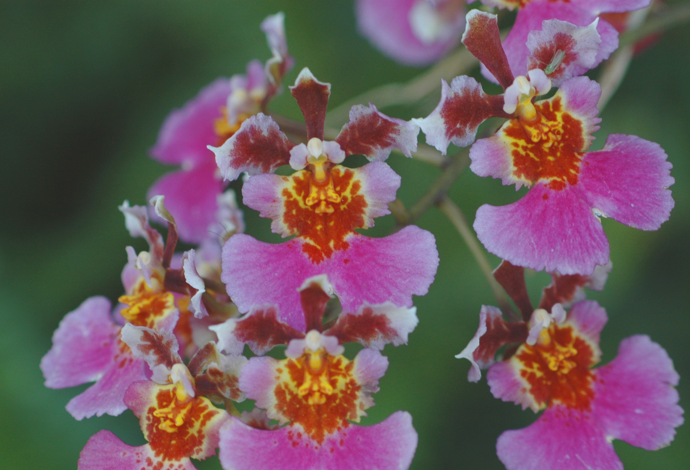 Grappe de fleurs d'Oncidium hybride en Floride. Photo personnelle.